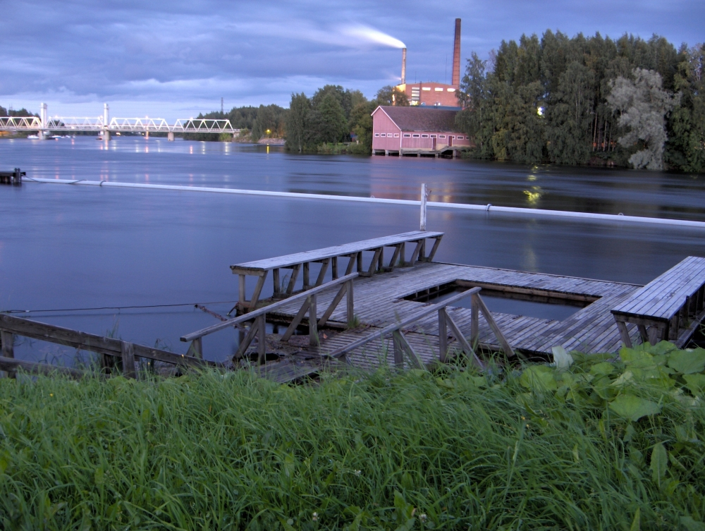 Joensuun vaneritehdas